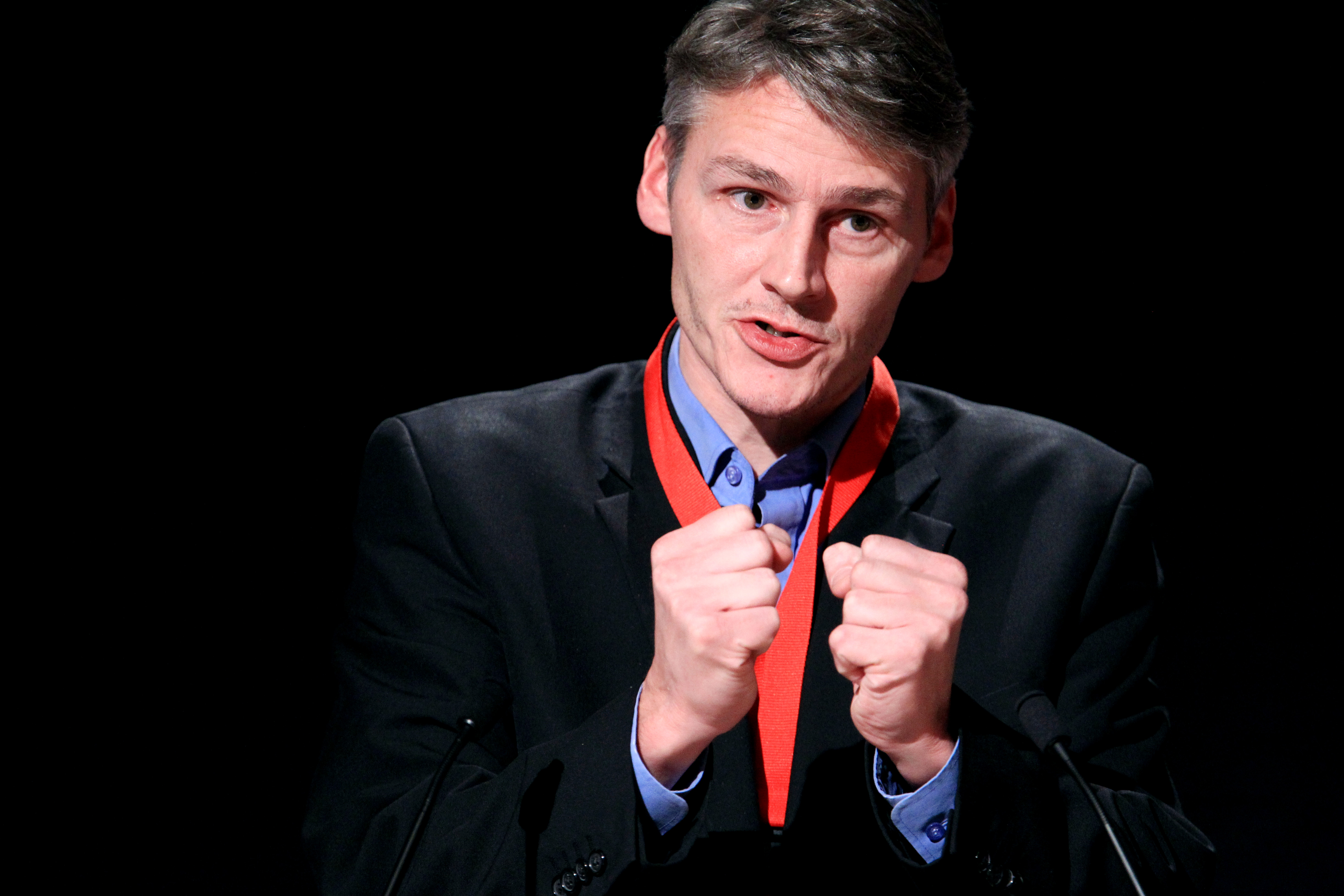 Høgni Hoydal vid Nordiska Rådets session i Reykjavik på Island. 2010-11-03.